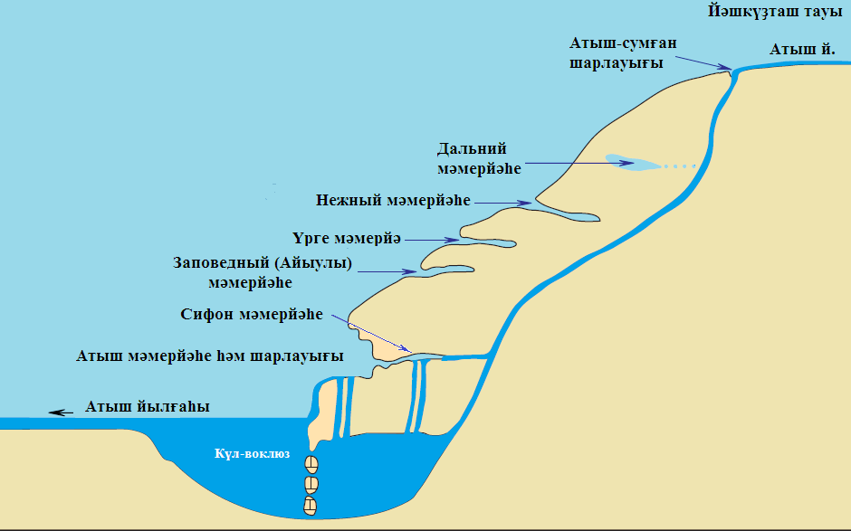 Схема расположения полостей пещер на горе Яшкузьташ и строения водопада Атыш